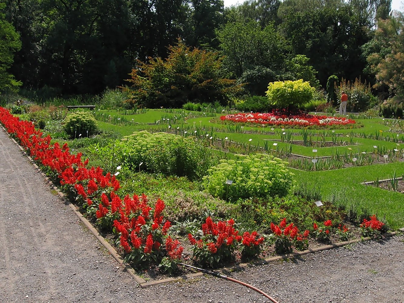 teren ogrodu